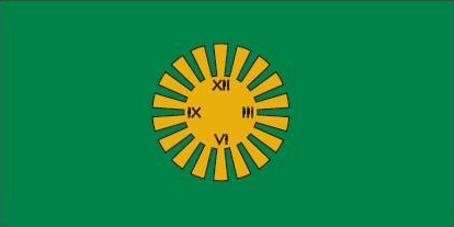 4.1. Priekuļu novada karogs ir taisnstūra audums ar platuma un augstuma attiecību 2:1; 4.2. Karogs ir divpusējs; 4.3. Karogs ir vienā tonī – zaļā krāsā, tā vidū ir attēlota Priekuļu novada ģerboņa saule. Ģerboņa augstums 3/5 no karoga augstuma, bet platums 1/4 no karoga platuma. Ģerboņa vertikālās un horizontālās asis sakrīt ar karoga vertikālajām un horizontālajām asīm; 4.4. Karoga krāsas: zelta – PANTONE 356C (aizvietotājs PANTONE 131C), zaļa – PANTONE 356C, melna – PANTONE black